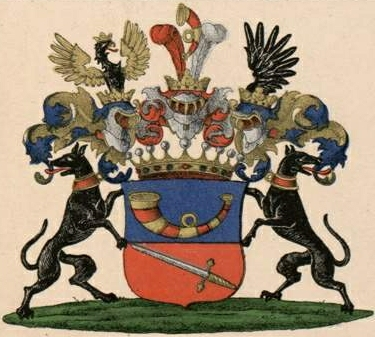 Medemi suguvõsa krahvivapp